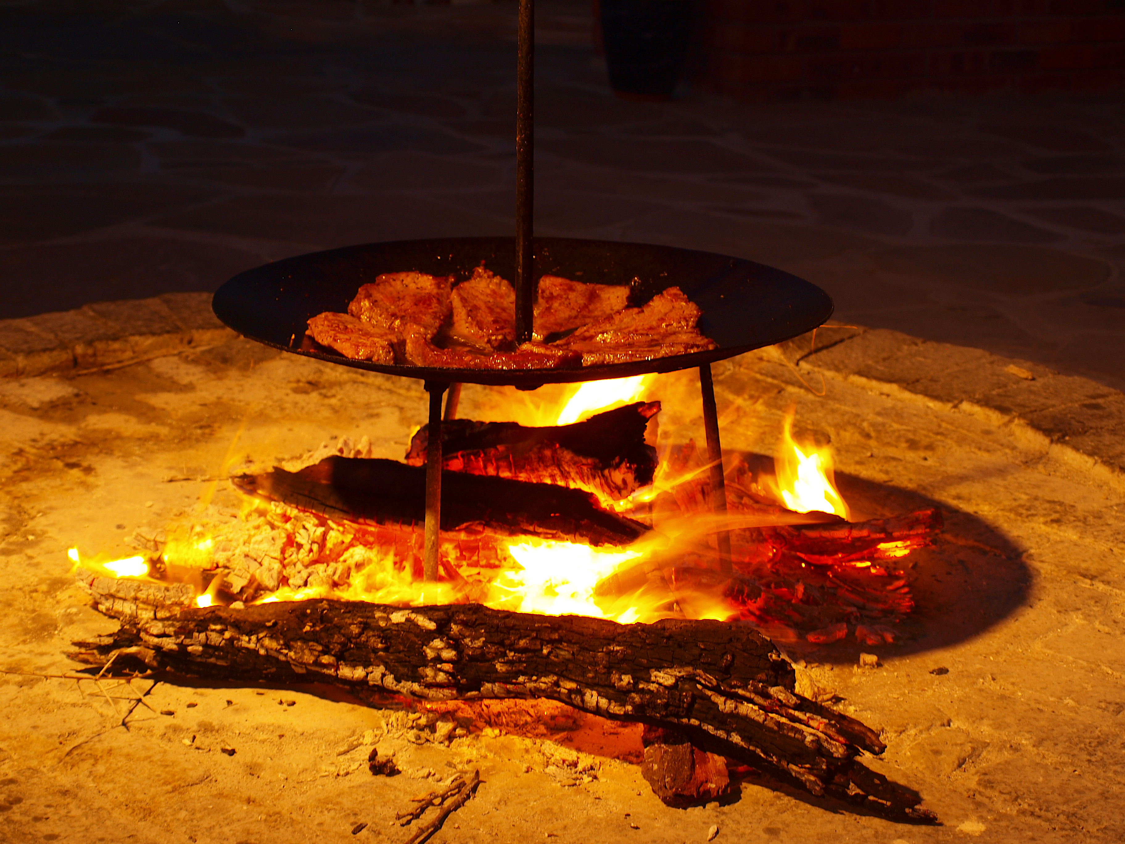 Braai in Onduruquea, Namibia